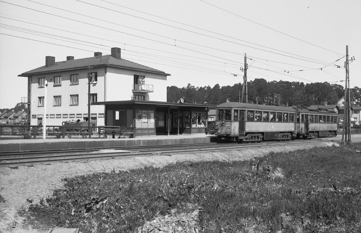 Enskedefältet, hållplats för spårvagnar linje 19